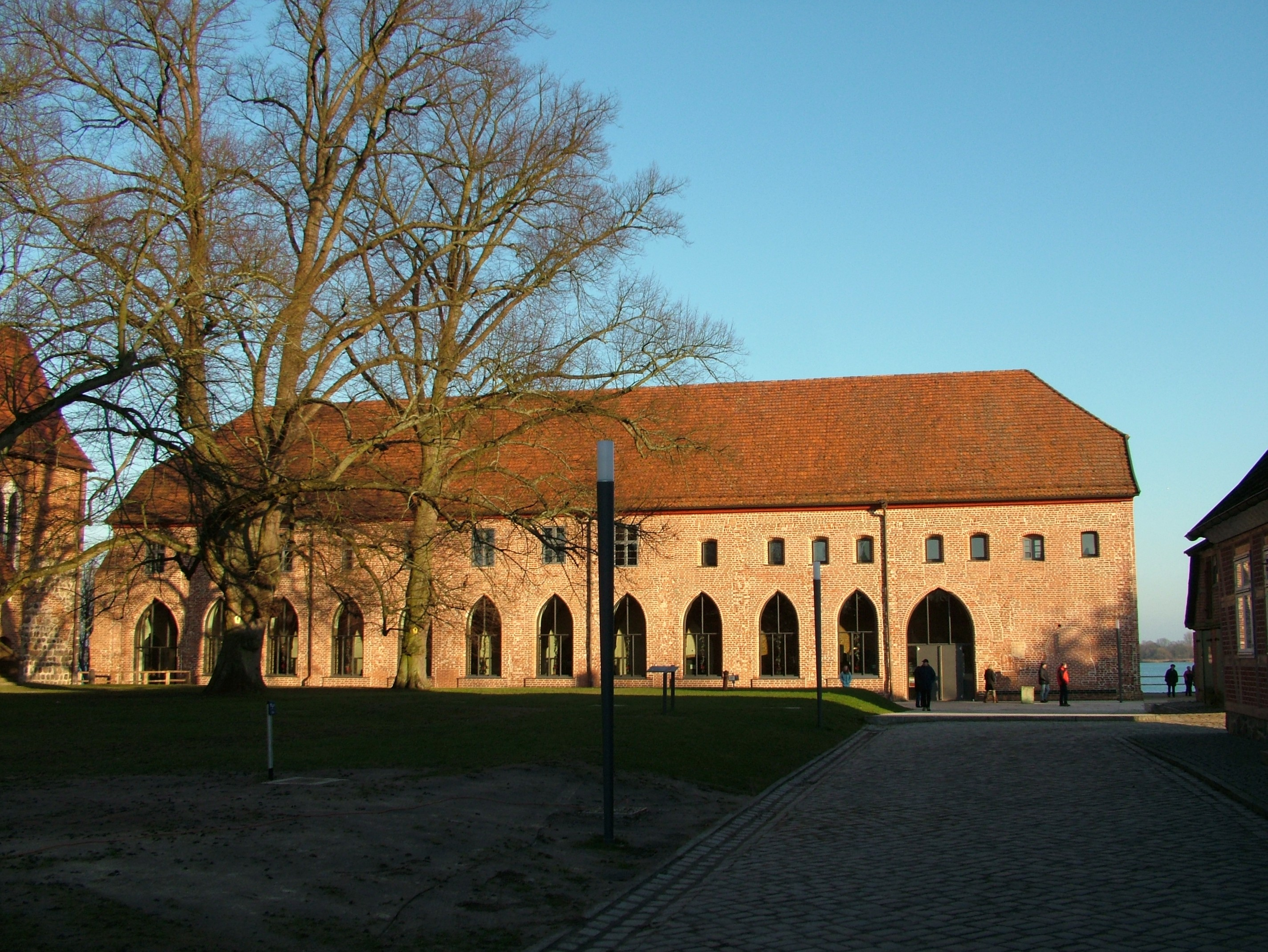 Zarrentin, Mecklenburg-Vorpommern, Deutschland, Klausurgebäude des ehemaligen Zisterzienerinnenkloster, heute Sitz des Amtes Zarrentin, Museum und Veranstaltungsort